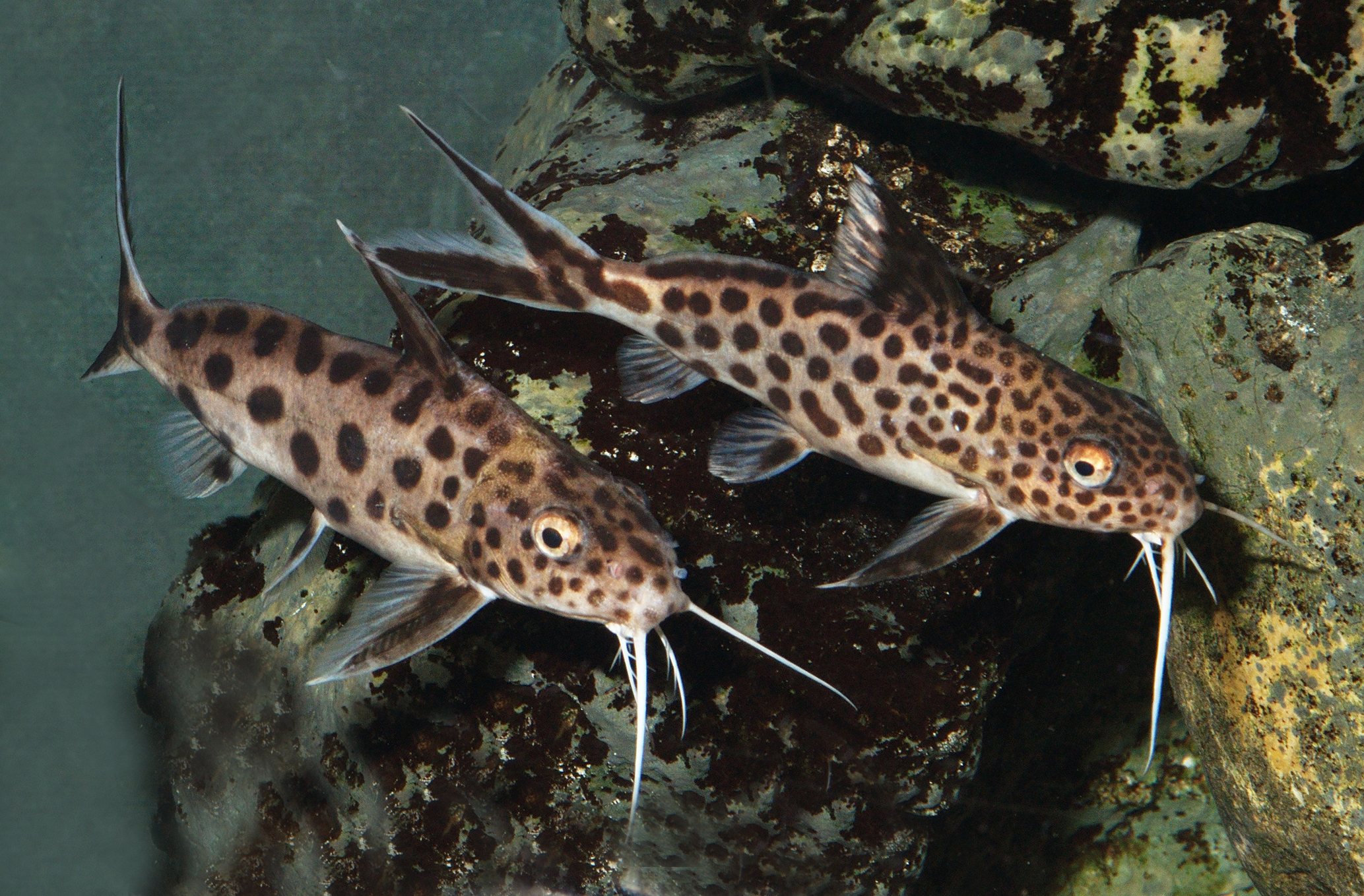 Fiederbartwels, Synodontis grandiops, Männchen und Weibchen, im Aquarium.